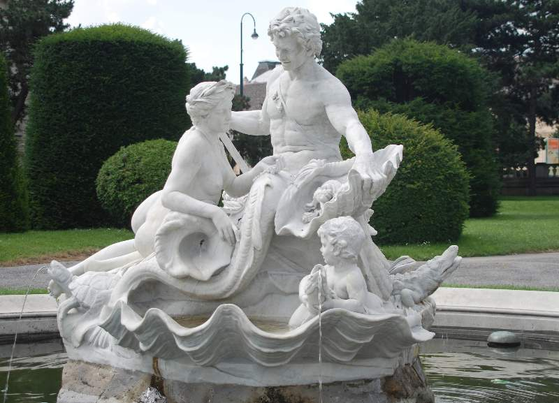 Brunnen D (Kunsthistorisches Museum / Museumstraße, Edmund Paul Andreas Hofmann von Aspernburg): Die insgesamt vier Tritonen- und Najadenbrunnen bilden die Zentren der vier großen Rasenflächen, welche durch die Hauptverbindungswege des Maria-Theresien-Platzes gebildet werden. Errichtet wurden die Brunnen in den Jahren 1887 bis 1890.